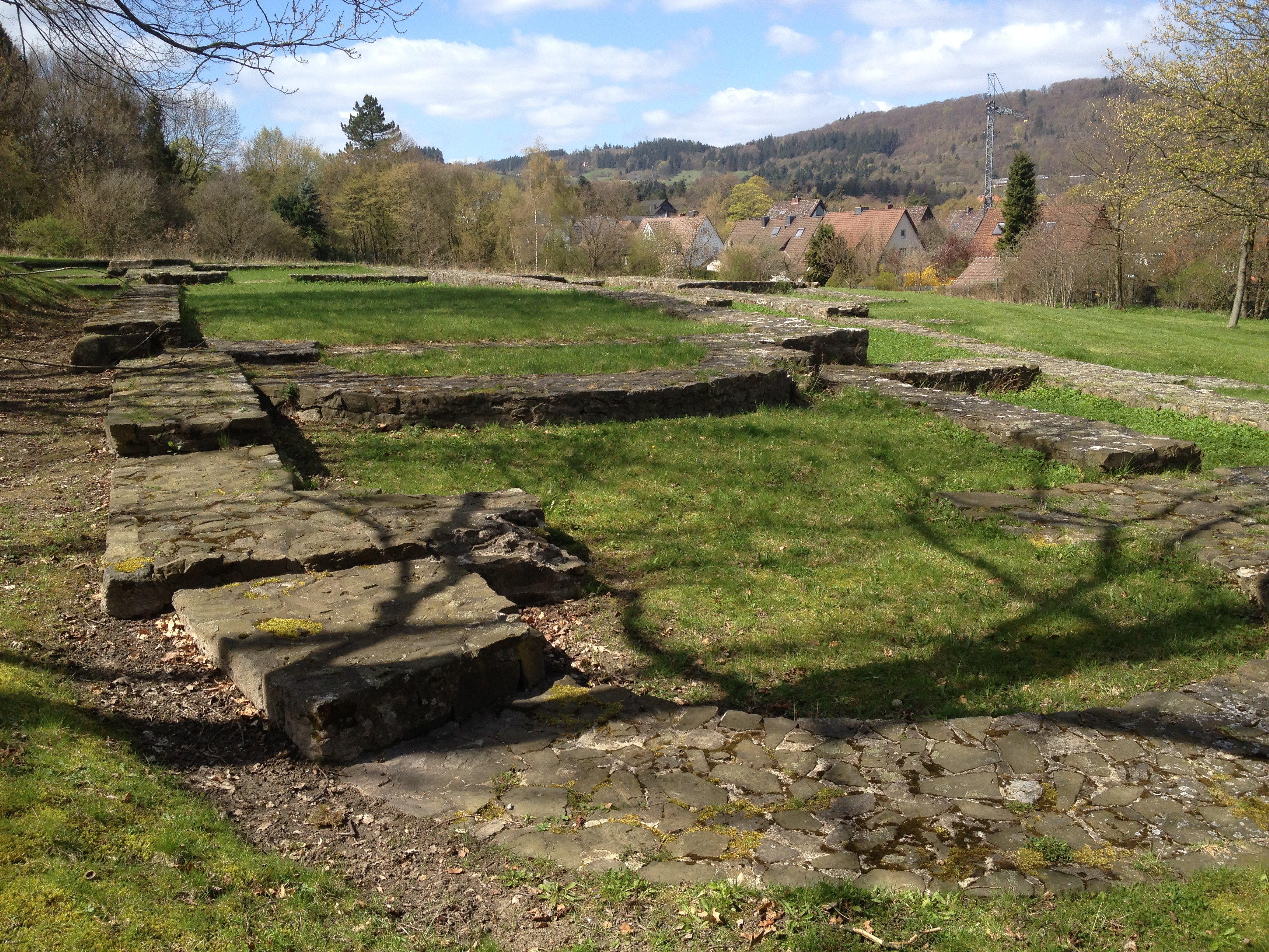 Grundmauern der St.-Johannes-Kirche am Rammelsberg